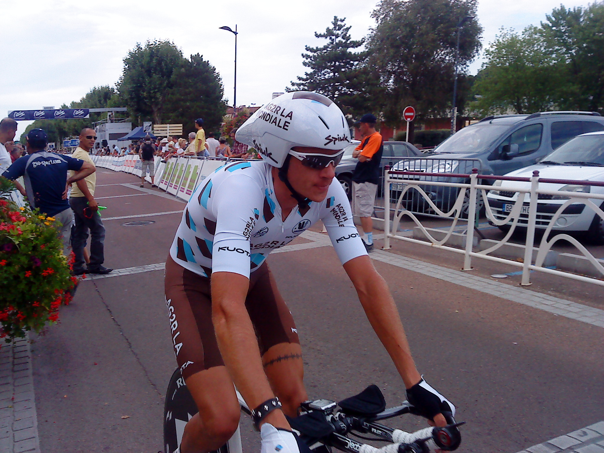 John Gadret à l'arrivée du prologue du Tour de l'Ain 2010